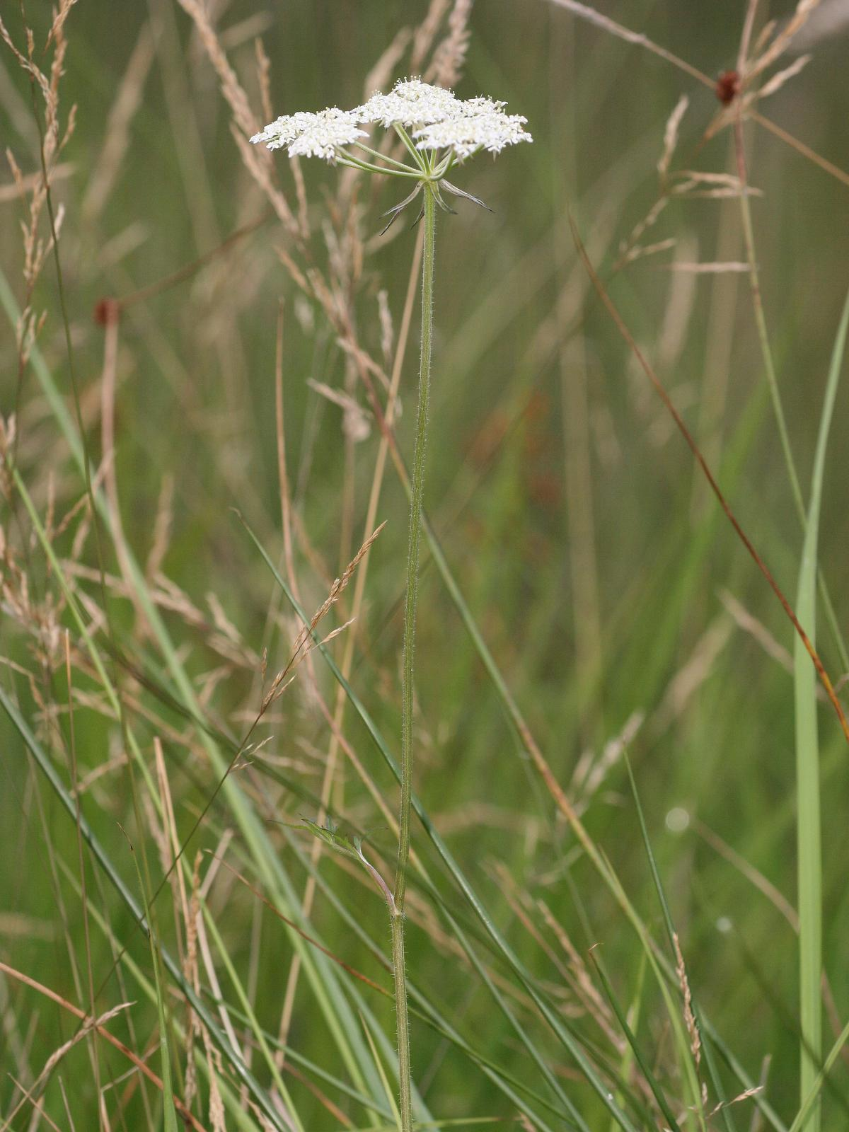 Preußisches Laserkraut (Laserpitium prutenicum)